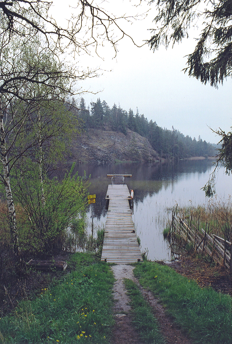 Bryggan vid Lojsta slott, Lojsta, Gotland